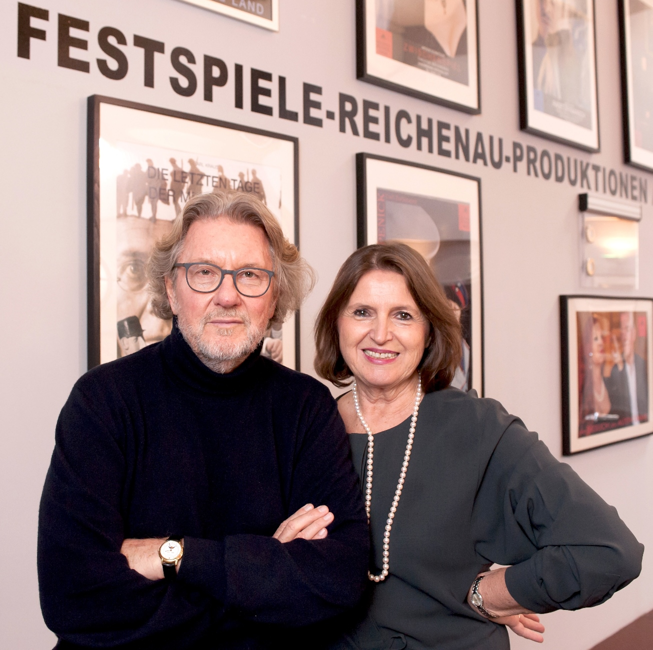 Die Gründer der Festspiele Reichenau